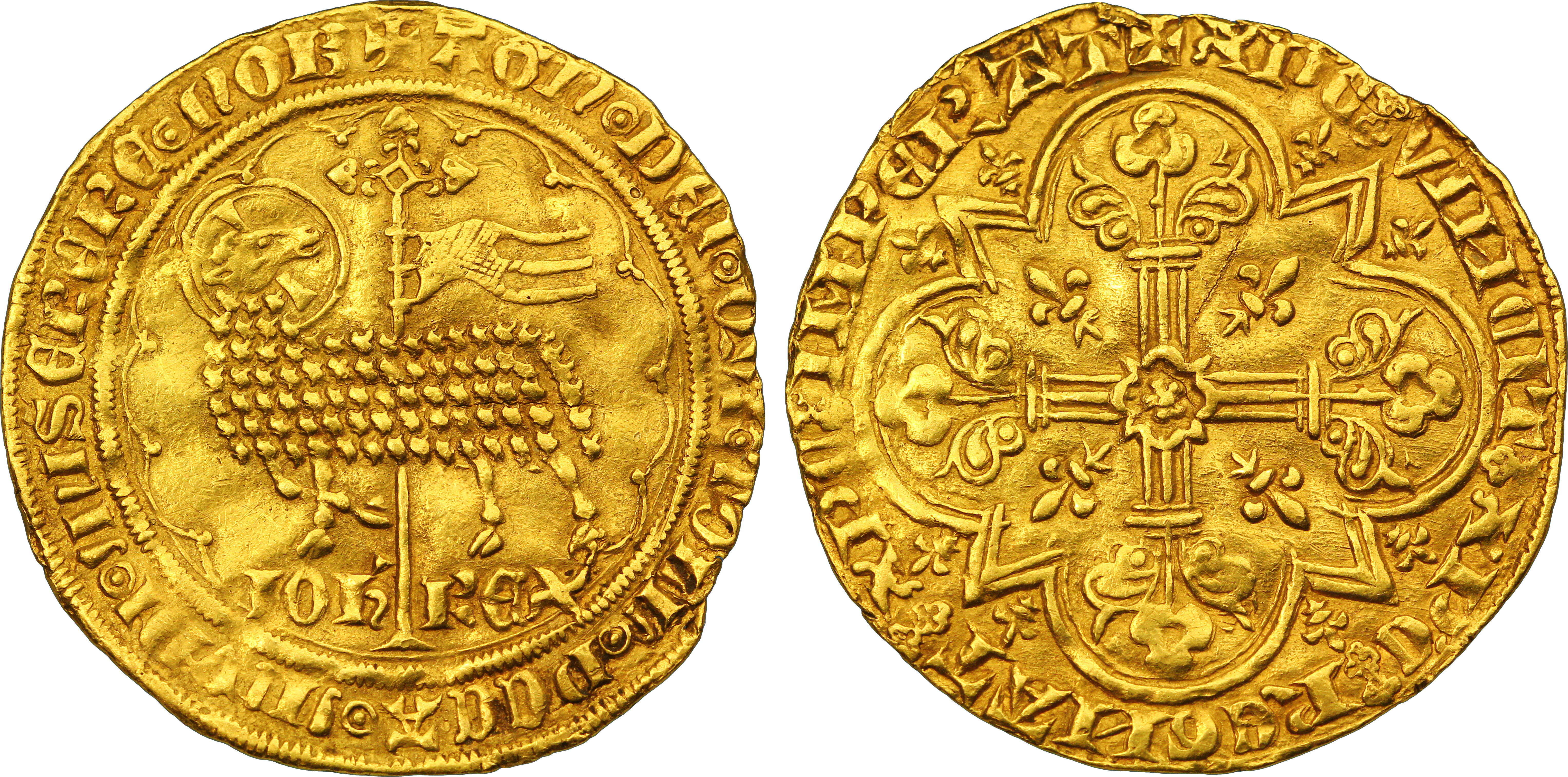 Nom de l'atelier/ville : s.l. Métal : or Titre en millième : 1000‰ Diamètre : 30mm Axe des coins : 8h. Titulature avers : + AGn° DEI° QVI° TOLL’° PCCA° mVDI° mISERERE° nOB, (M et N onciales, ponctuation par simple annelet pointé). Description avers : Agneau pascal à gauche, tournant la tête à droite avec un nimbe crucigère, devant une croix avec gonfanon qui coupe la légende de l'exergue dans un polylobe interrompu en bas ; à l'exergue IOh' - REX. Traduction avers : (Jean, roi ; agneau de Dieu qui enlève les péchés du monde, prends pitié de nous). Titulature revers : + XP'C* VINCIT* XP'C* REGNAT* XP'C* IMPERAT, (N rétrogrades, ponctuation par deux quadrilobes évidés et superposés). Description revers : Croix tréflée et feuillue, avec en cœur une rose dans un petit quadrilobe, accostée de quatre lis, dans un quadrilobe anglé cantonné de huit petits lis. Traduction revers : (Le Christ vainc, le Christ règne, le Christ commande). Fabrication: 17 January 1355